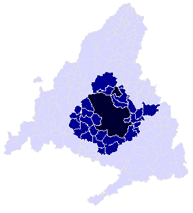 Mapa del Area Metropolitana de Madrid según el Atlas de la CAM. Fuente No oficial.